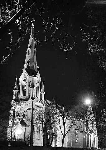 Aleksanterin kirkko Tampereella juhlavalaistuksessa 10.12.1938.